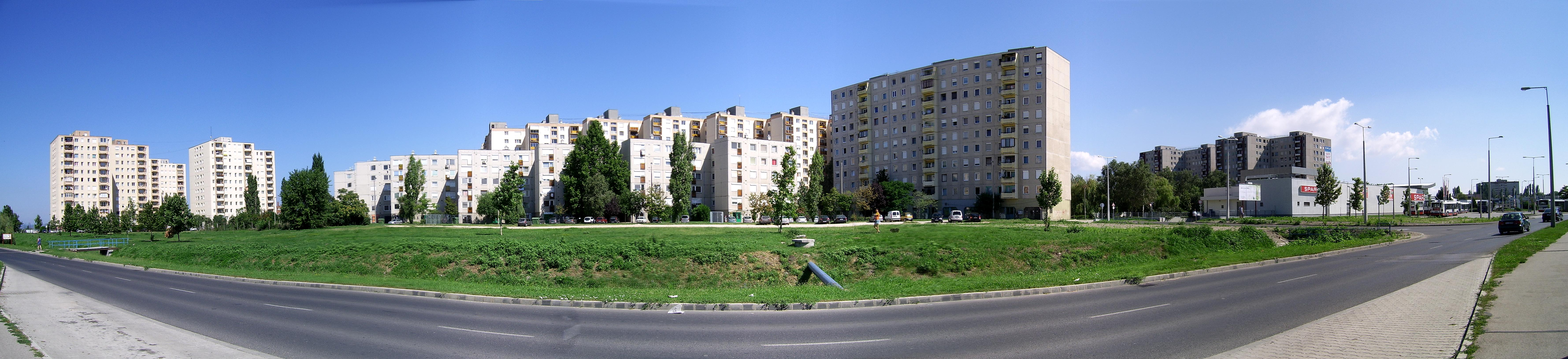 Palotaváros